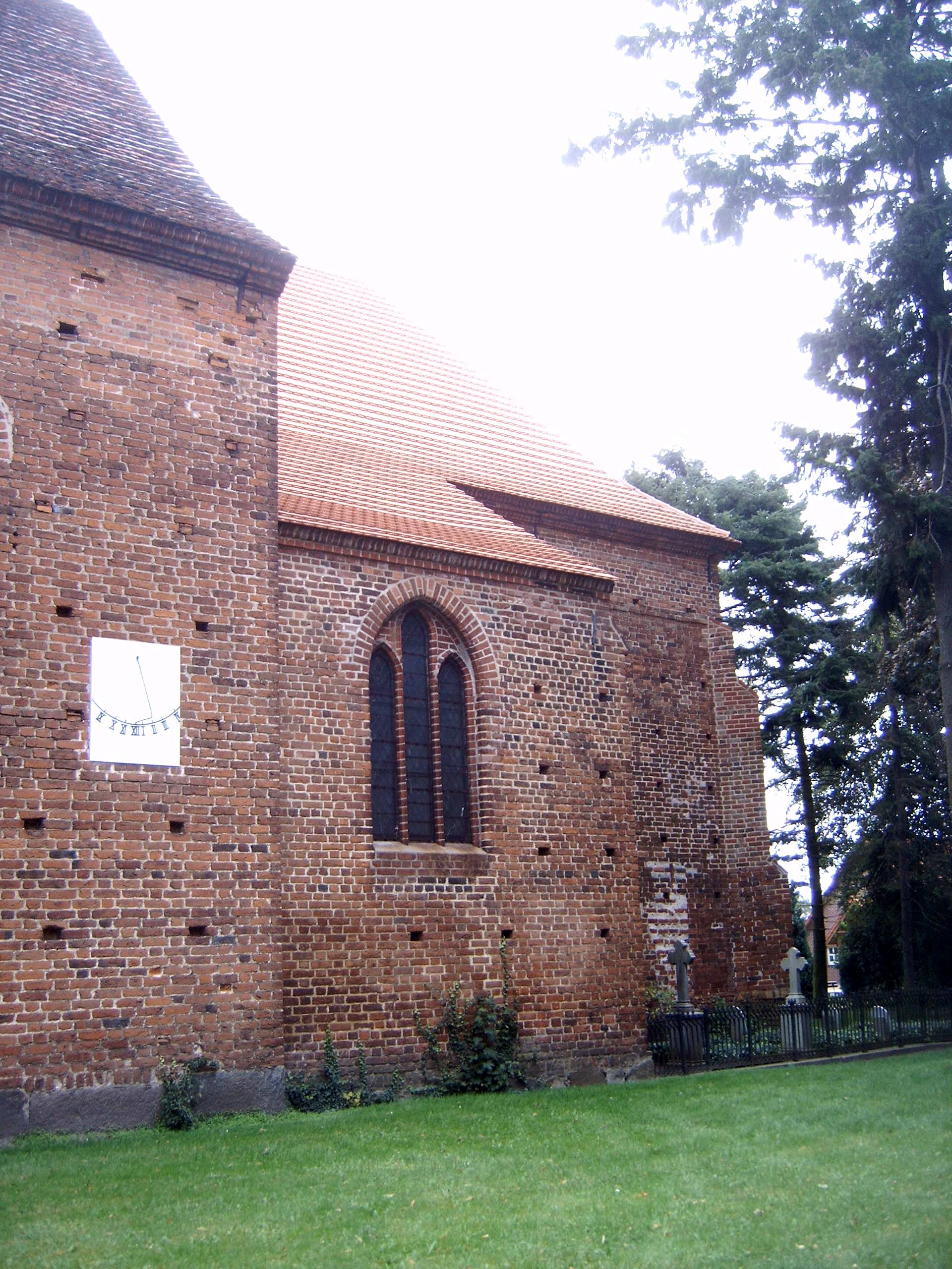 Chor der Sankt Jacob Kirche in Gingst auf Rügen, Deutschland